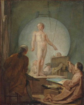 Gabriel-Jacques de SAINT-AUBIN L'Académie de dessin, huile sur toile, 59,9 × 48,4 cm